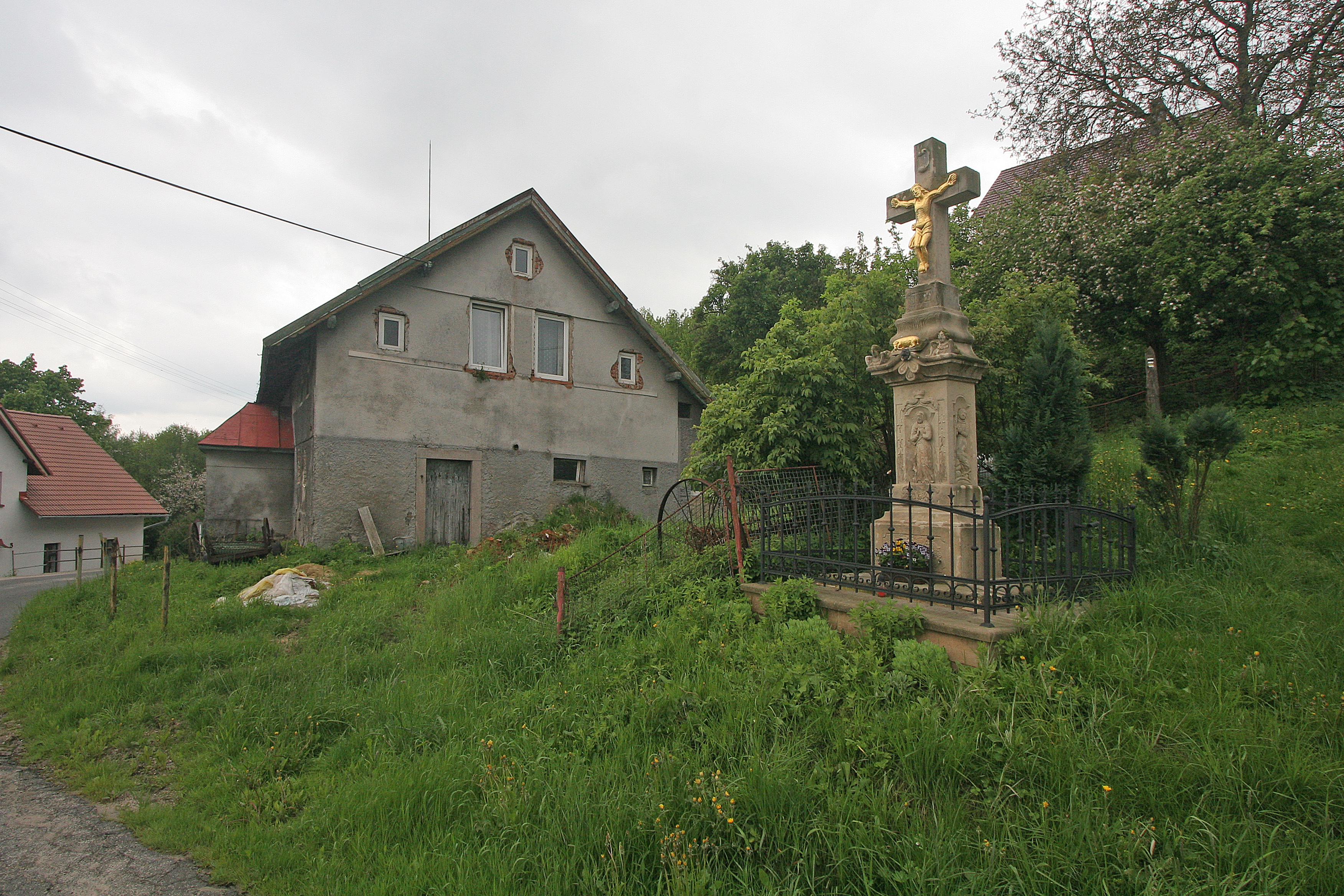 Komárov křížek